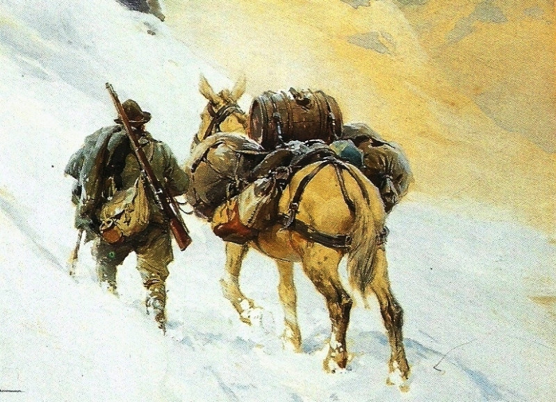 Quadro di un alpino italiano con il suo mulo, rappresentati da Achille Beltrame nel 1916 vedi (see)